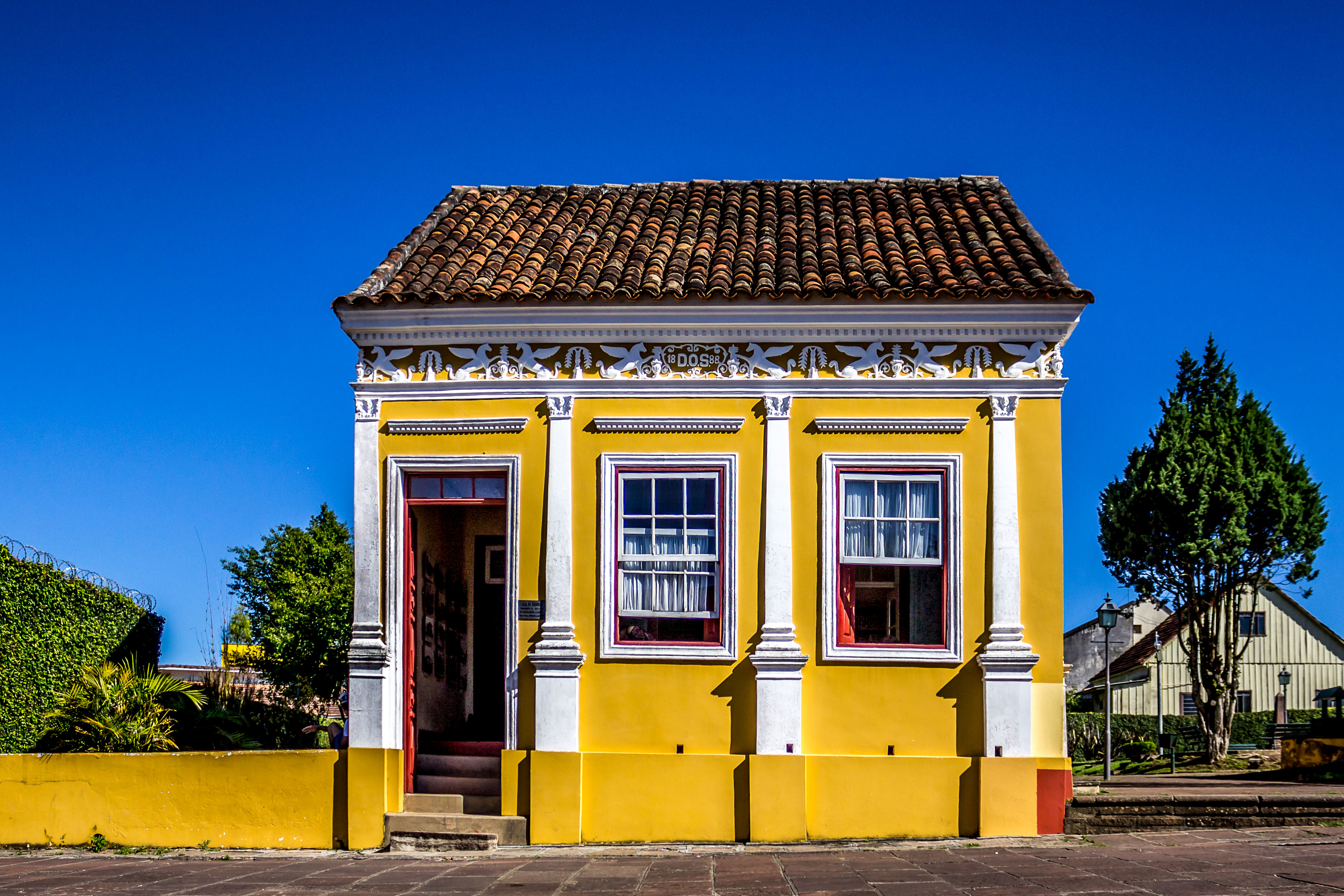 Lapa, PR: conjunto arquitetônico e paisagístico história da Casa dos Cavalinhos: certa noite o primeiro morador daquela residência sonhou com cavalos alados, no outro dia apostou na loteria imperial e ganhou o prêmio máximo da época. Depois disso, construiu uma nova casa no local, com cavalos esculpidos na fachada em homenagem ao sonho que o deixou rico. Com o nome oficial de “Casa da Memória”, o local abriga um rico arquivo histórico do município que não é encontrado em nenhum outro lugar da Lapa. Arquivo esse que pode ser muito útil em trabalhos sobre a Lapa e a sua história.